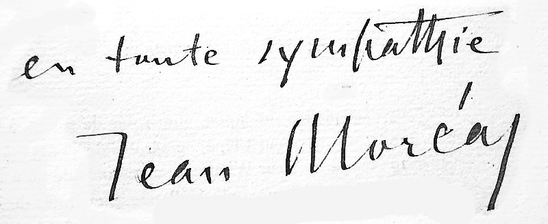 Envoi de Jean Moréas